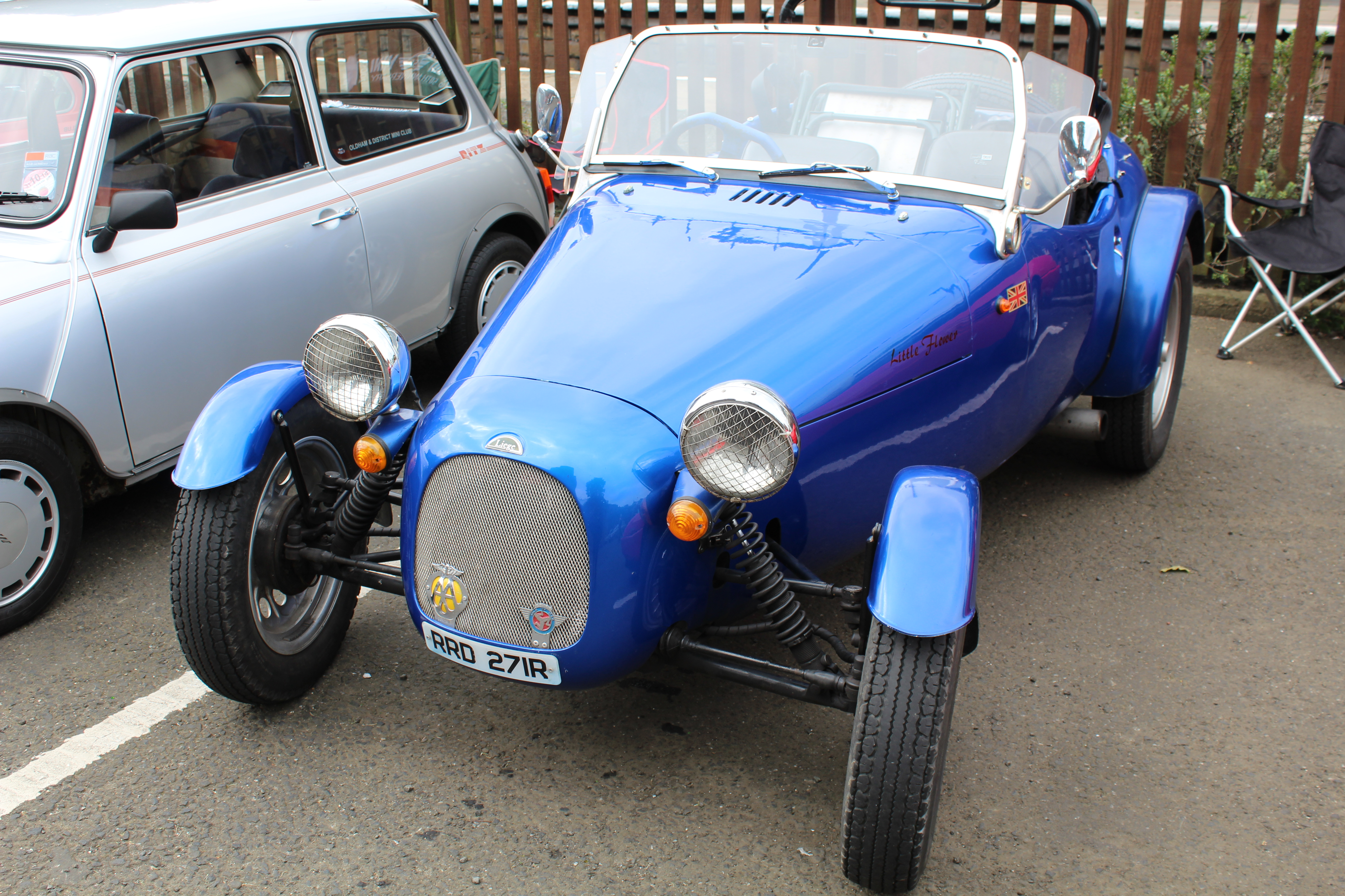 Liege